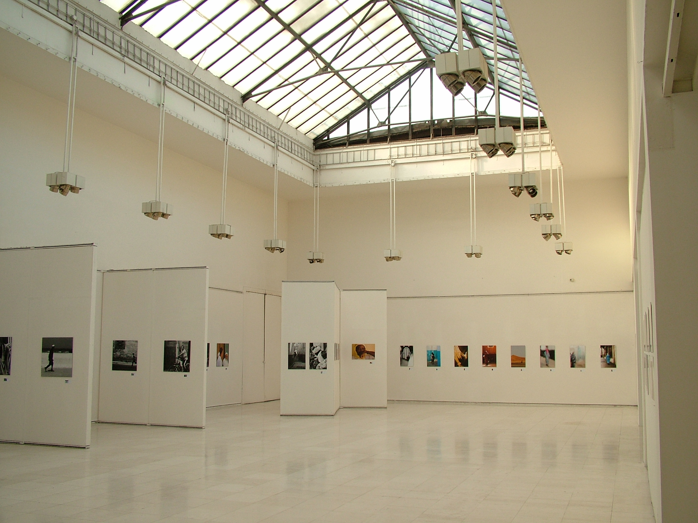 Galerie Mánes - Šítkovský mlýn, výstava Jan Foltán, Maroko - Brána Západu, 2012.